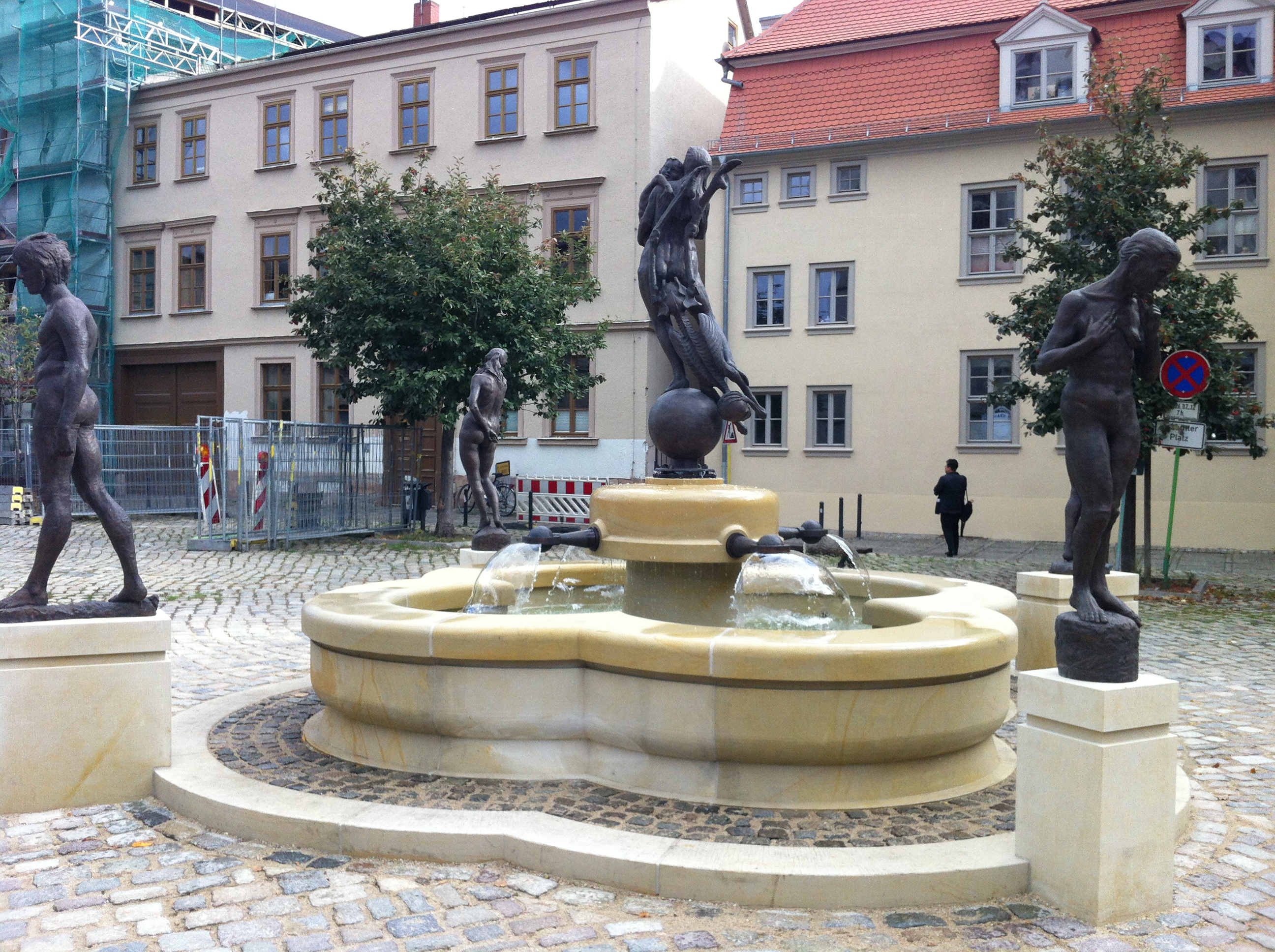 Der Brühmannbrunnen auf dem Domplatz in Halle (Saale)